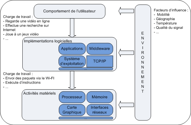 interaction du matériel, logiciels, utilisateurs mobiles et de l'environnement